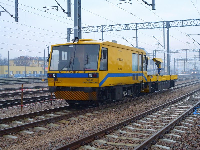 Spalinowy mikrobus szynowy MS-W-01 należący do przedsiębiorstwa PKP Polskie Linie Kolejowe stoi na stacji Tarnów.